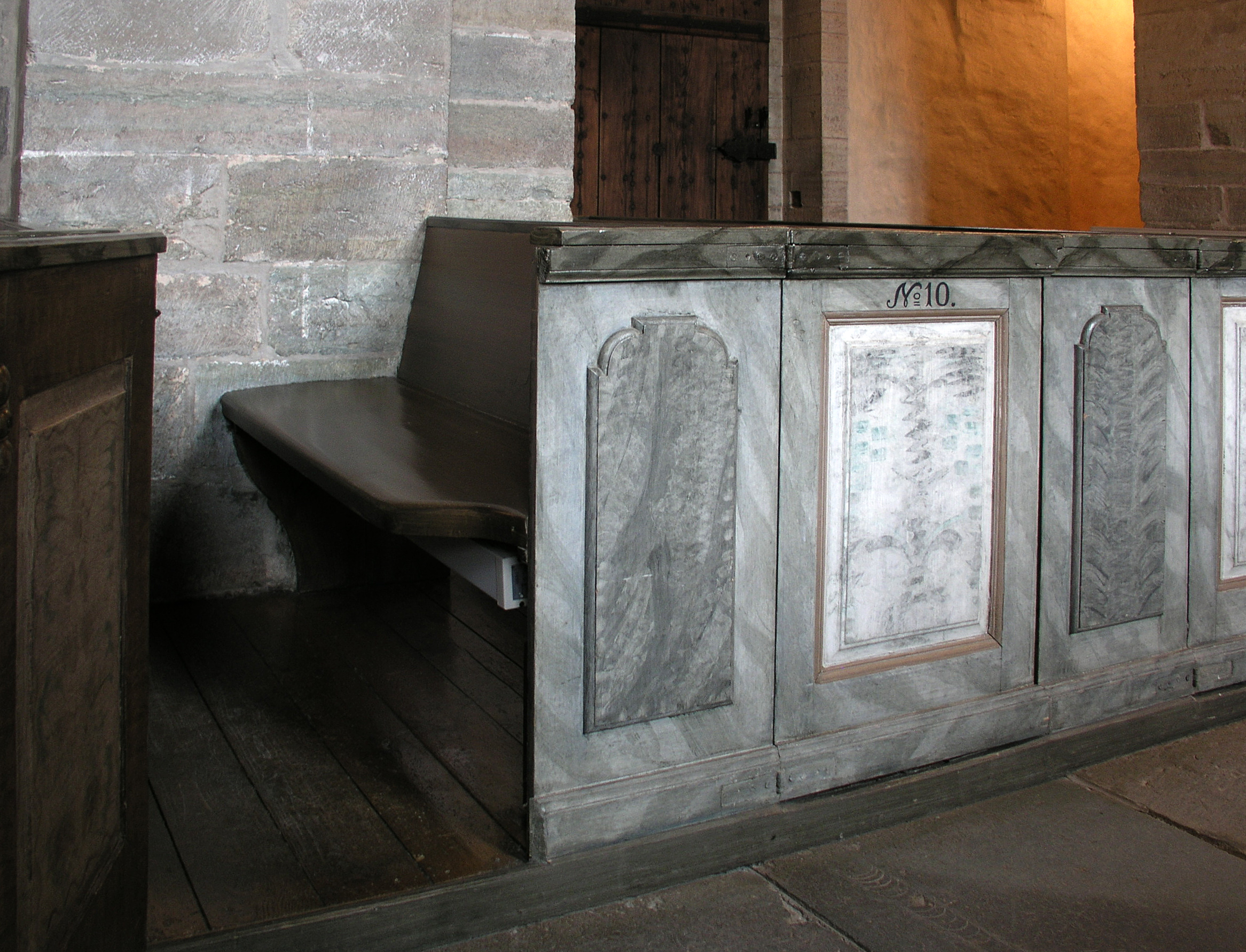 Vreta Klosterkyrka Church bench in Vreta Monastery Church